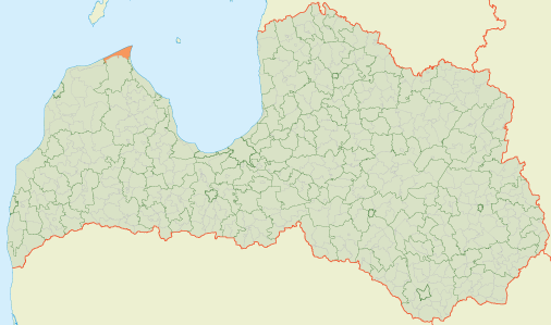 Kolkas pagasts